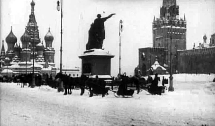 Cъемка производилась от Верхних торговых рядов (ГУМ по-нынешнему). На переднем плане видно памятник Минину и Пожарскому на его первоначальном месте установки, построенному по проекту скульптора Ивана Мартоса (макет памятника 1808 г.) на деньги, полученные от всенародного сбора средств, начатого по всей Росии 1 января 1809. Торжественное открытие памятника на Красной площади, сопровождавшееся парадом, состаялось 4 марта 1818 г. На втором плане видно Спасскую башню, выглядывающие из-за крепостной стены главки Вознесенского собора. Собор Покрова Пресвятой Богородицы (храма Василия Блаженного).